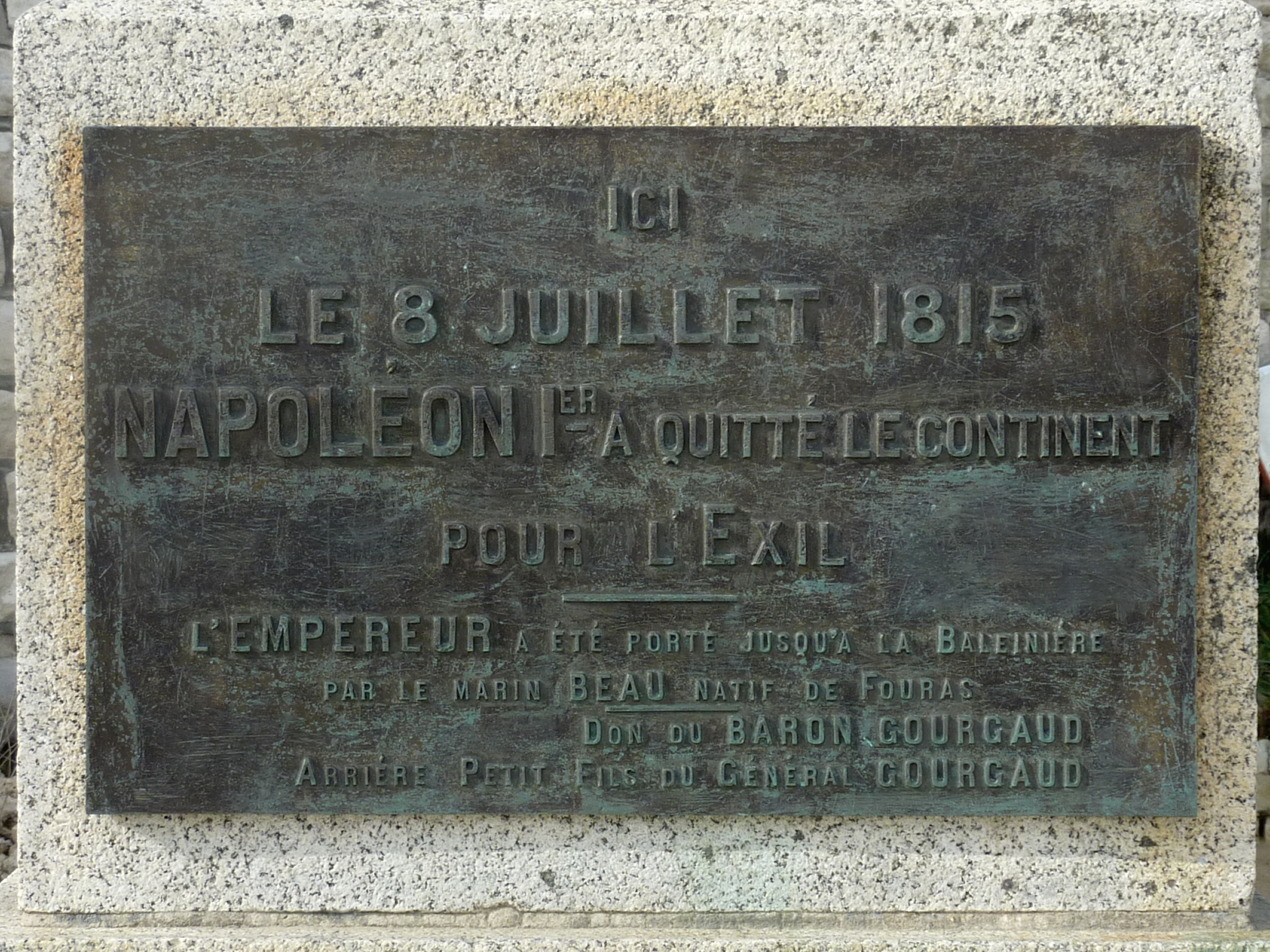 Plaque commémorative du mémorial Napoléon 1er Plage Sud de Fouras Charente Maritime France